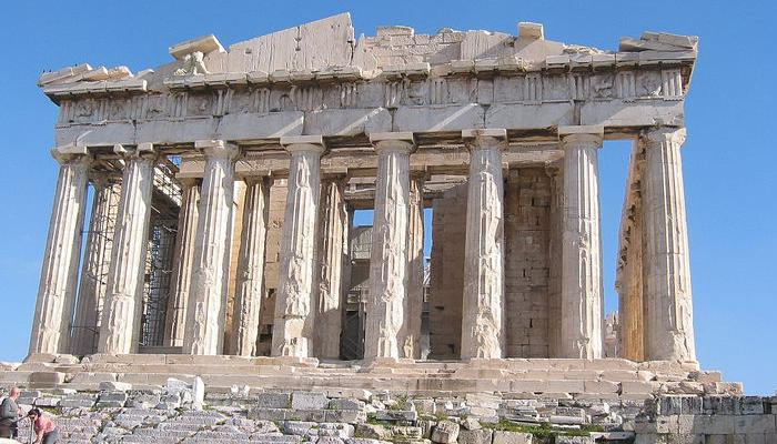 Đền Pathenol in Hy Lạp